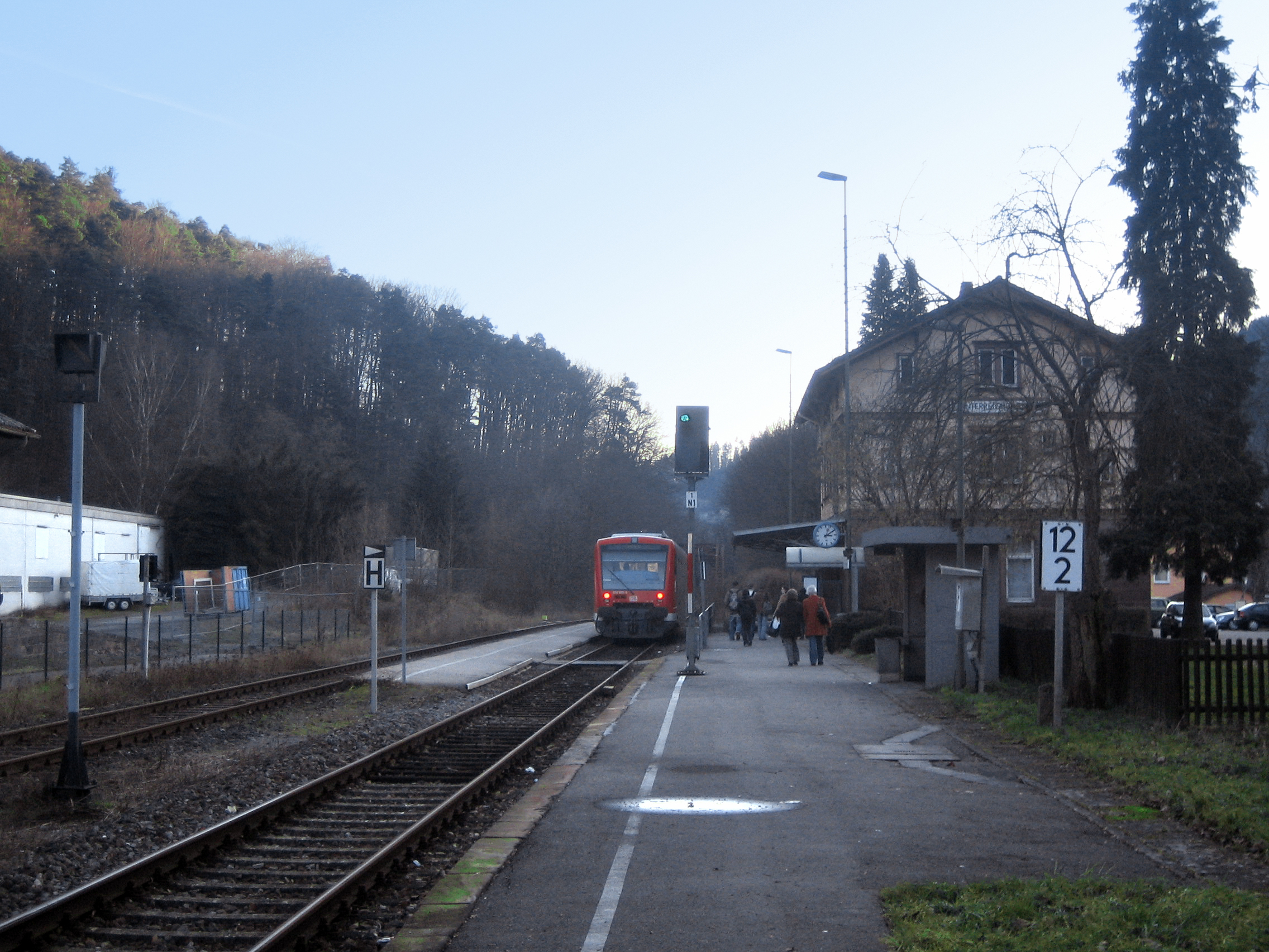 Bf. Unterreichenbach